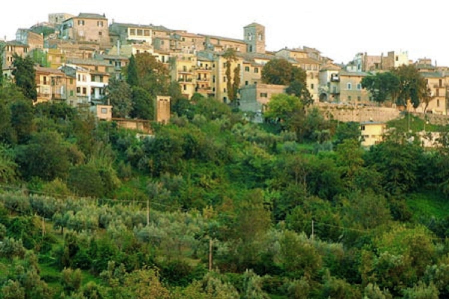 Panoramica di Montopoli